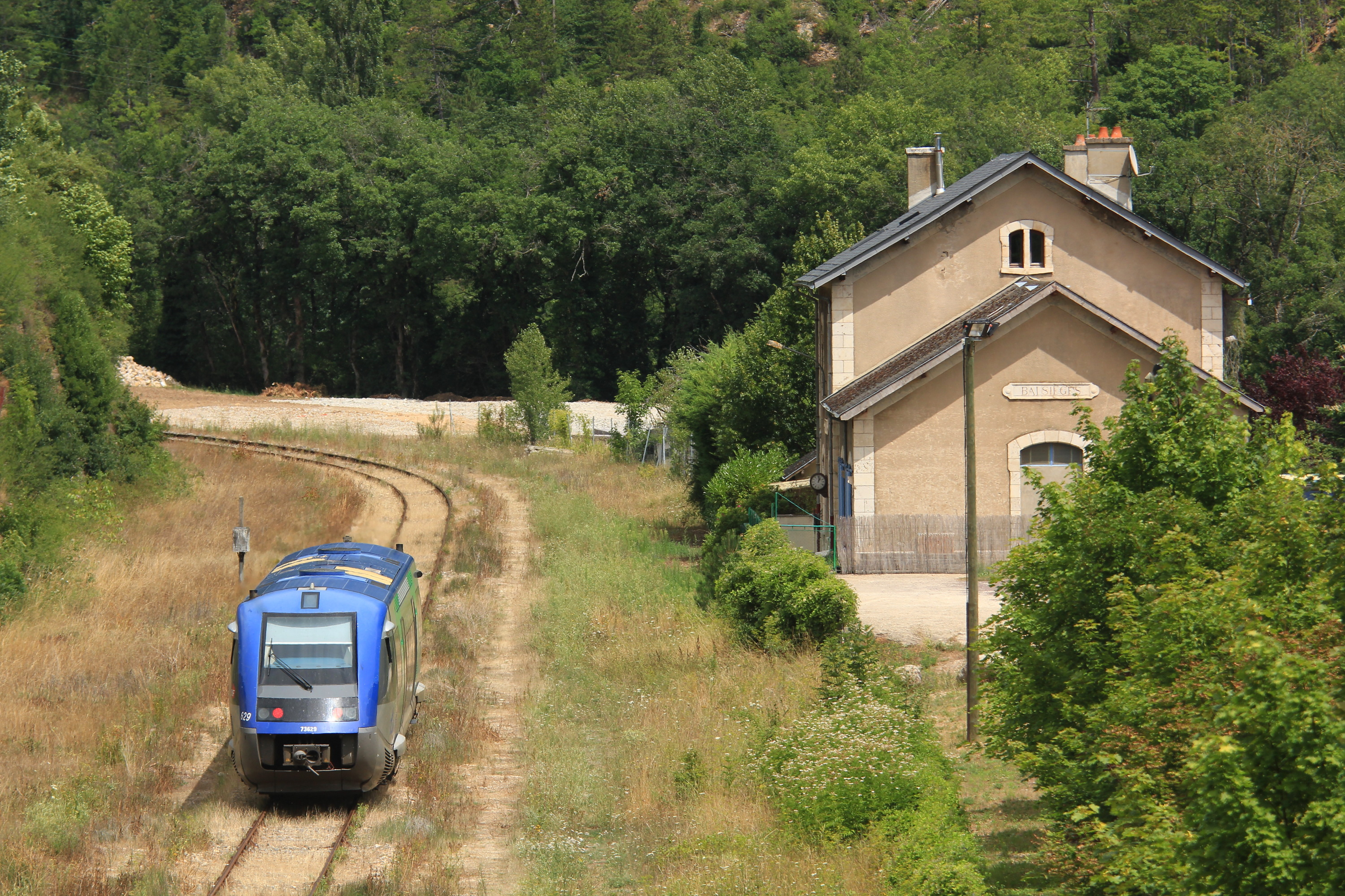 Vue générale de l'ancienne gare de Balsièges en direction de Mende, lors du passage du TER n° 879983 (Marvejols 13h53 - Mende 14h40) assuré par l'X 73629 en livrée Auvergne.